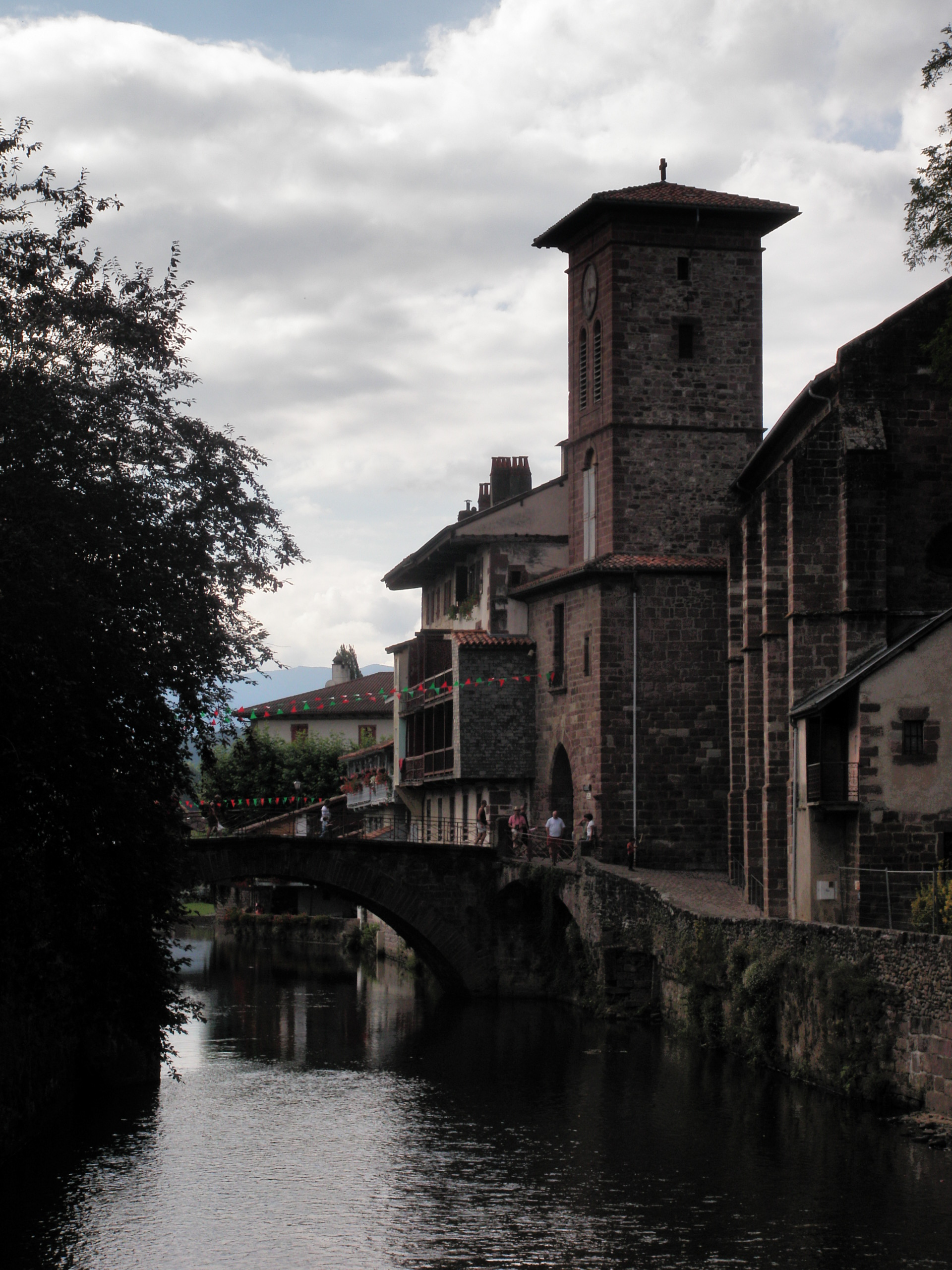 Citadelle, Saint JEan Pied de Port, Pays Basque